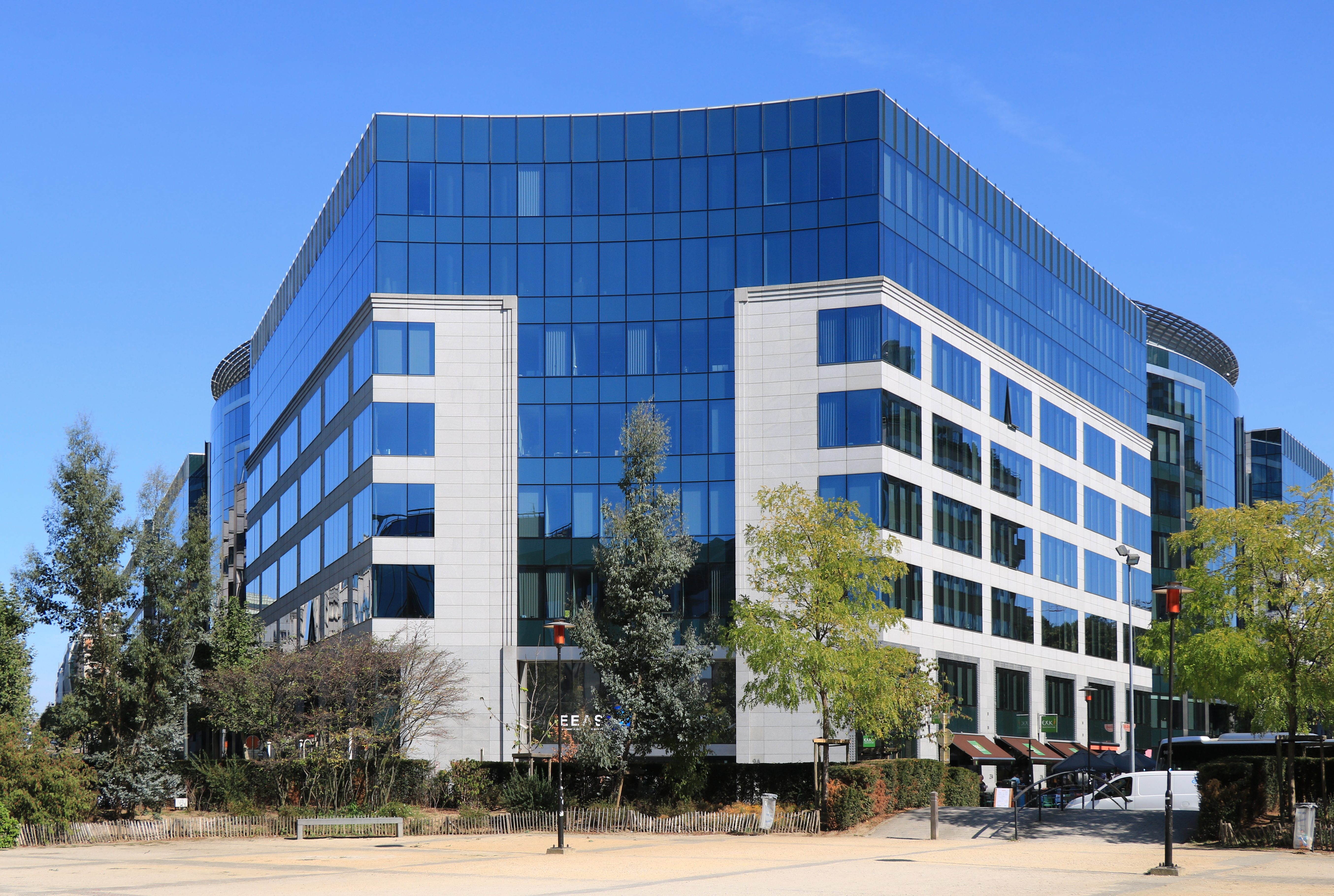 Belgique - Bruxelles - Rond-point Schuman - Immeuble The Capital ou Triangle Building - Atelier d'architecture de Genval - Postmodernisme - 2001-2009 This photo of immovable heritage has been taken in the Brussels Capital Region